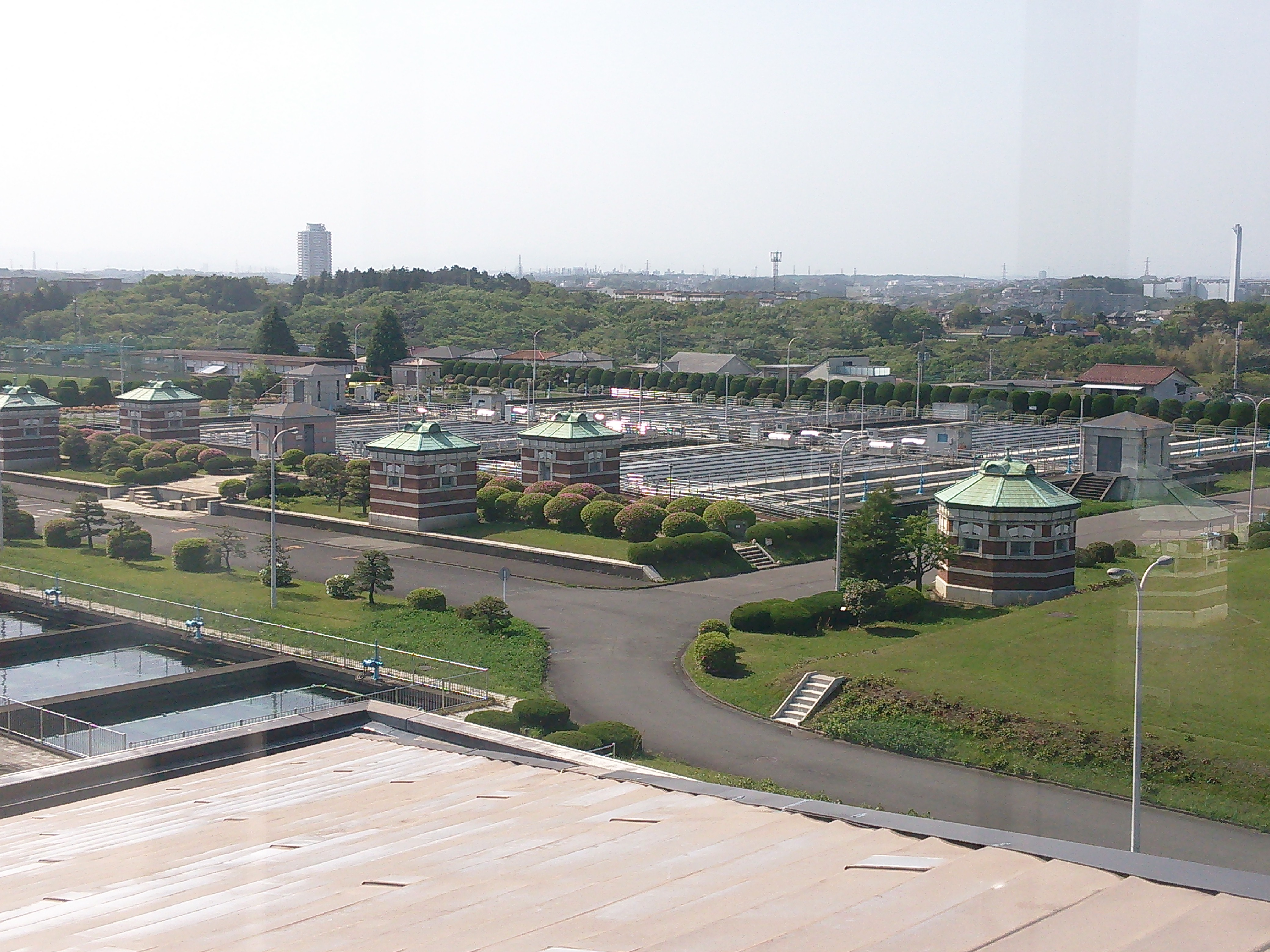 横浜市保土ケ谷区、横浜市水道局西谷浄水場